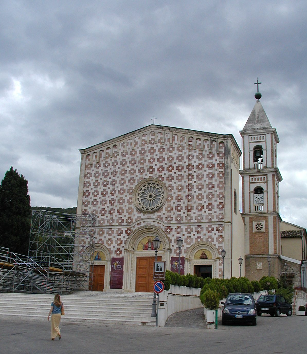 Die Kirche in dem der Schleier gezeigt wird